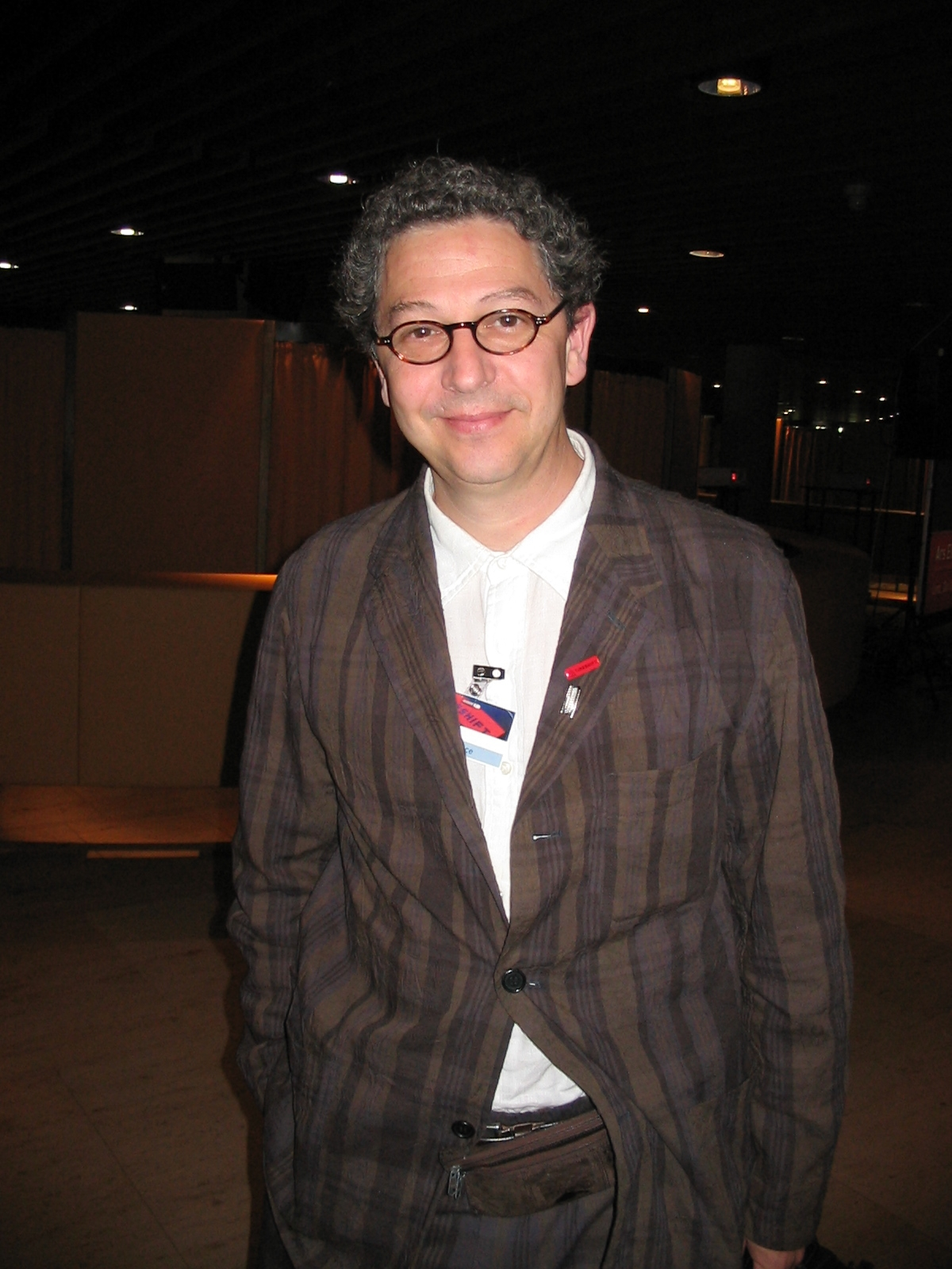 Luc Courchesne